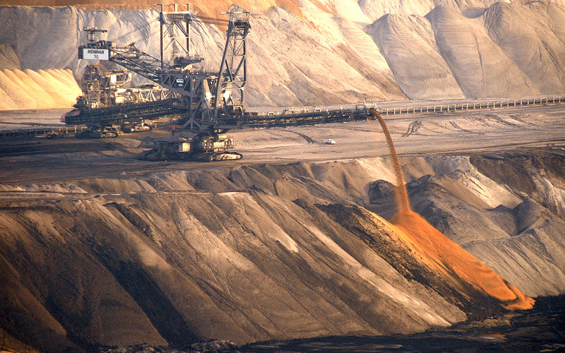 Absetzer 760 im Tagebau Garzweiler